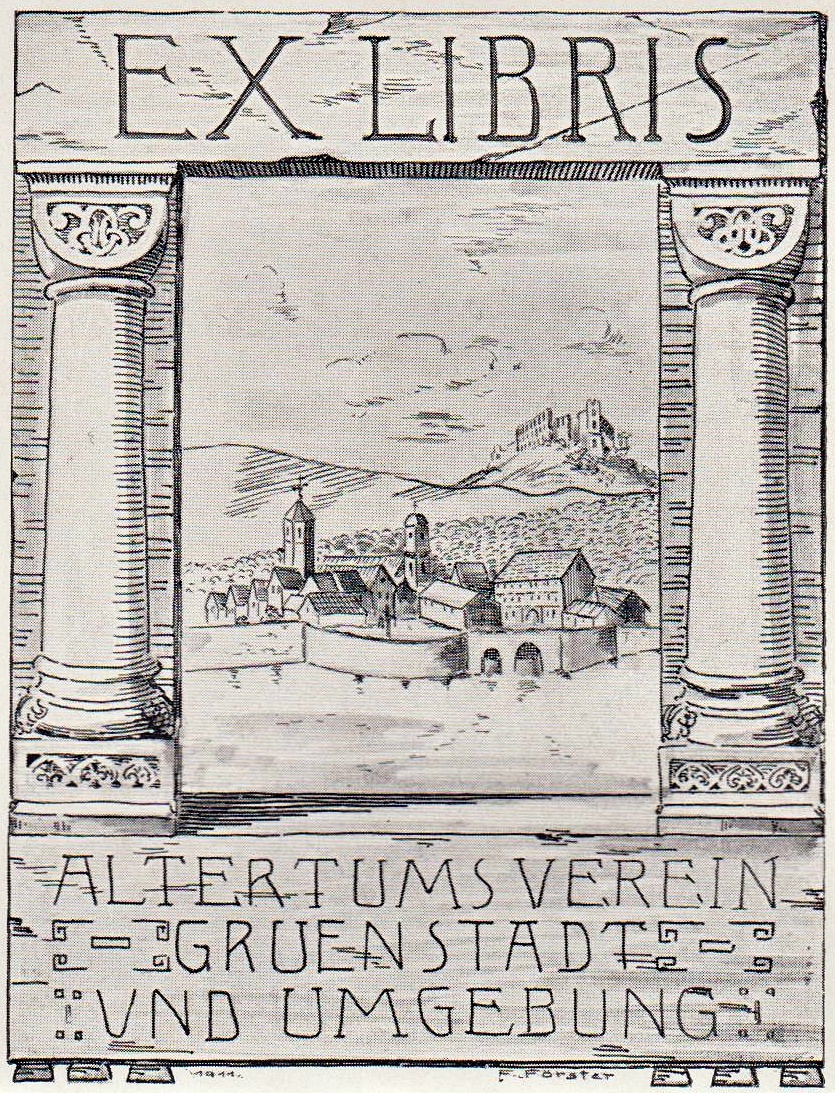 Exlibris des Altertumsvereins Grünstadt, 1911, eigener Scan von eigenem altem Exlibris